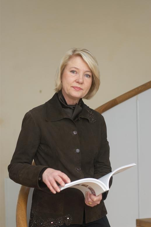 Riksantikvarie Inger Liliequist i Östra stallet.